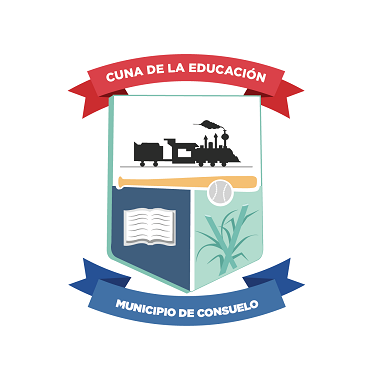 Escudo que representa al Municipio Consuelo, diseñado y pintado por Rafael Severino Reyes (Raser), y Luís Estévez Montas, respectivamente. Se aprecia en su diseño, una locomotora, símbolo de nuestro trabajo y del origen de nuestro nombre; un bate de béisbol, representando el deporte que nos ha hecho famosos; un libro abierto, símbolo de nuestras escuelas y nuestro esfuerzo de superación; y unos troncos de caña, que representa el producto de nuestra economía. Lleva los colores blanco (símbolo de paz y armonía) y verde (esperanza y fe).